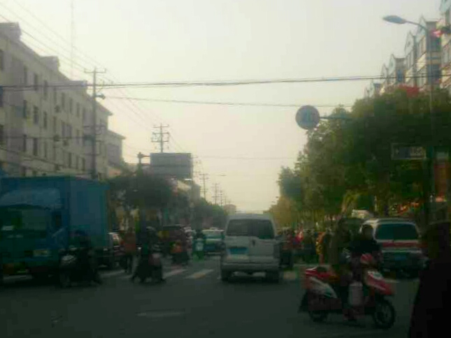 新河镇 新河公路北新支路口